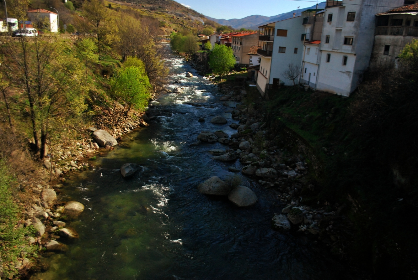 Río Jerte a su paso por Cabezuela del Valle (provincia de Cáceres, España), entre la carretera nacional 110 y la calleja de la Fuente los Caños.